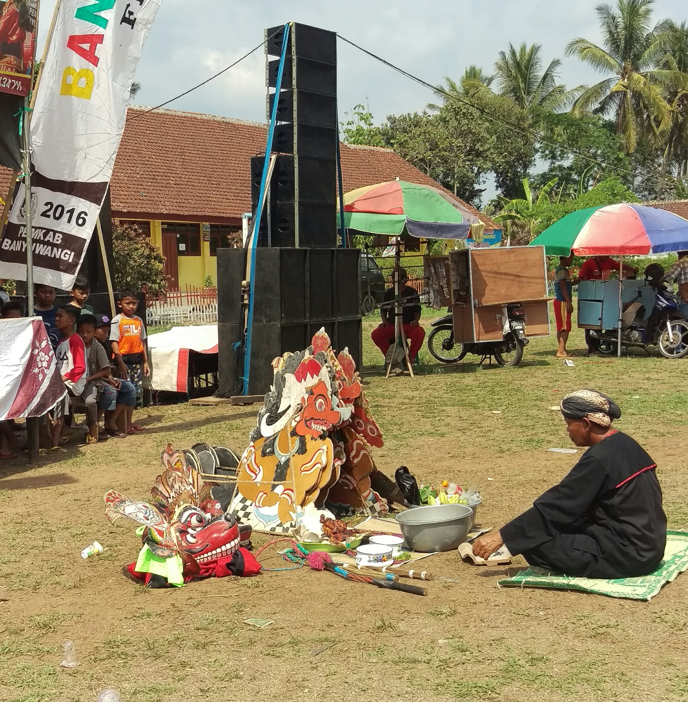 Pawang Jaranan dari Banyuwangi sedang melakukan ritual sebelum acara dimulai agar diberi keselamatan. This photo has been taken in the country: Indonesia